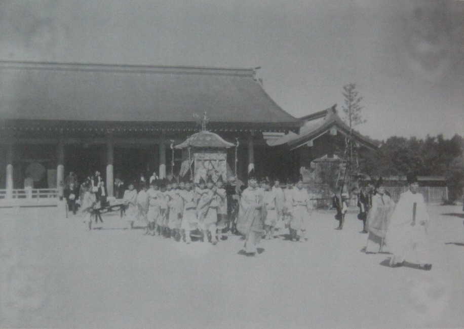 第二代的臺中神社